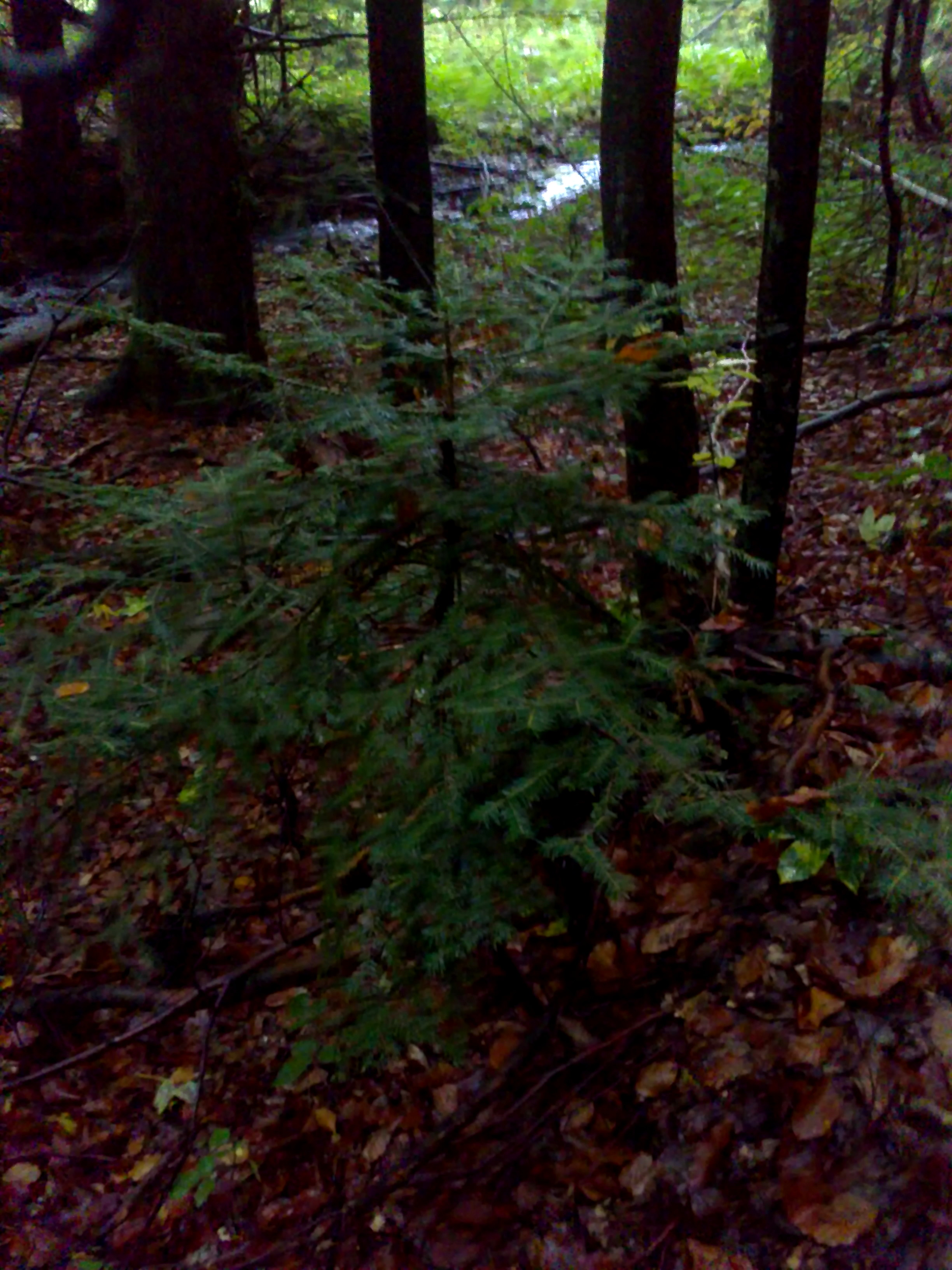 Mladý ihličnatý stromček v Badínskom pralese.